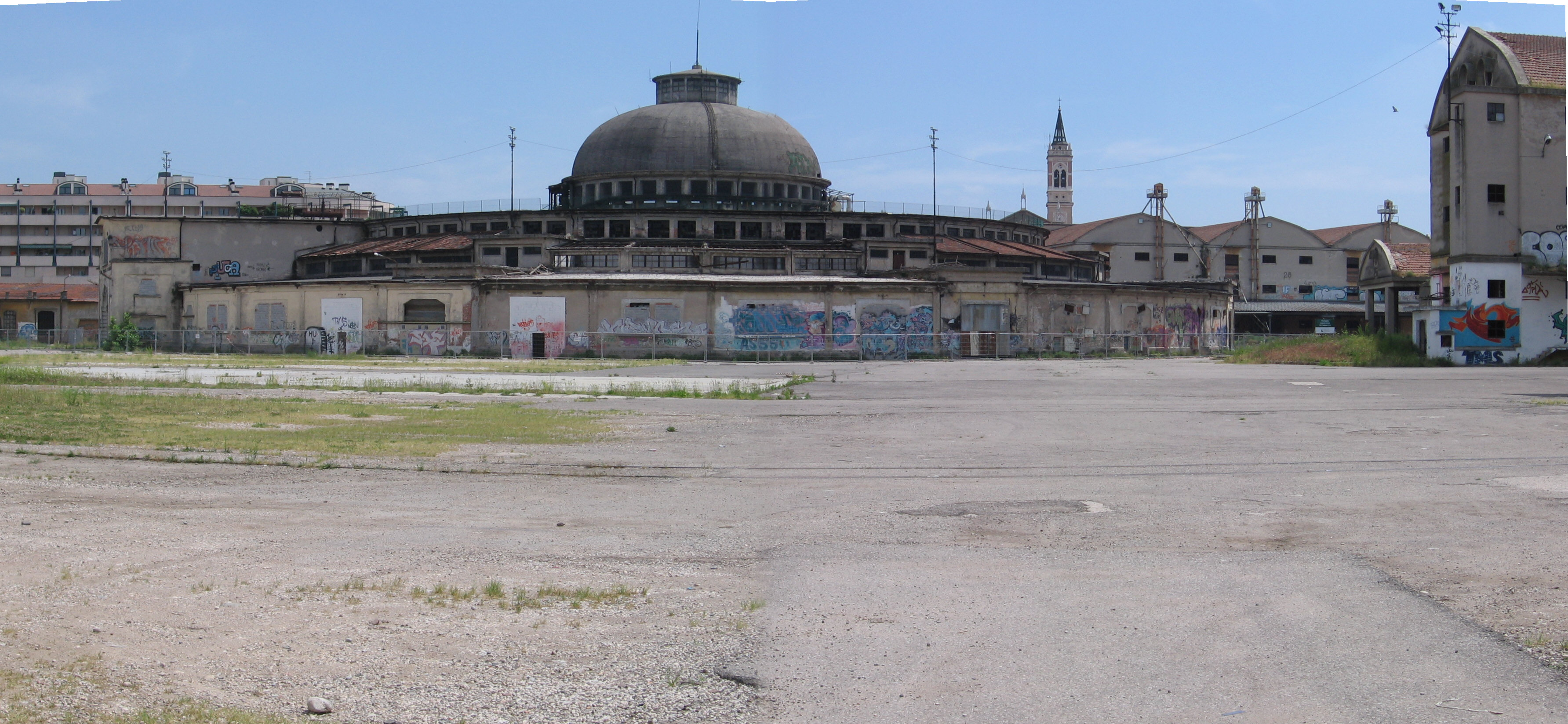 Former magazzini generali (general depot) in Verona